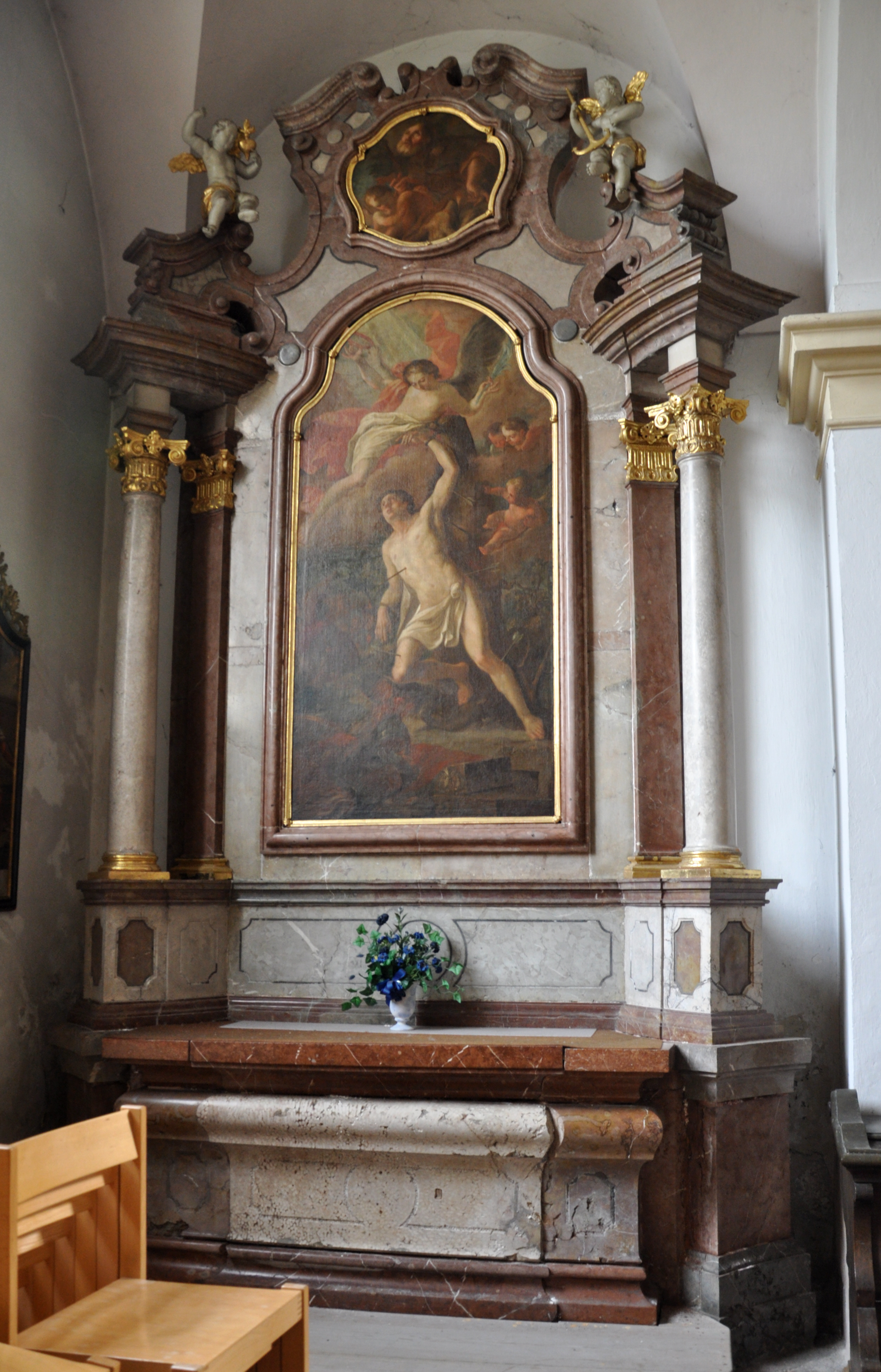 Stiftskirche Reichersberg, Oberösterreich Sebastianialtar, roter Marmoraltar von Jakob Mösl (1775), Altarblatt: Hl. Sebastian von Joseph Bergler d. J. (Passau), im Aufsatz: Hl. Rochus von Joseph Bergler d. J. (Passau)